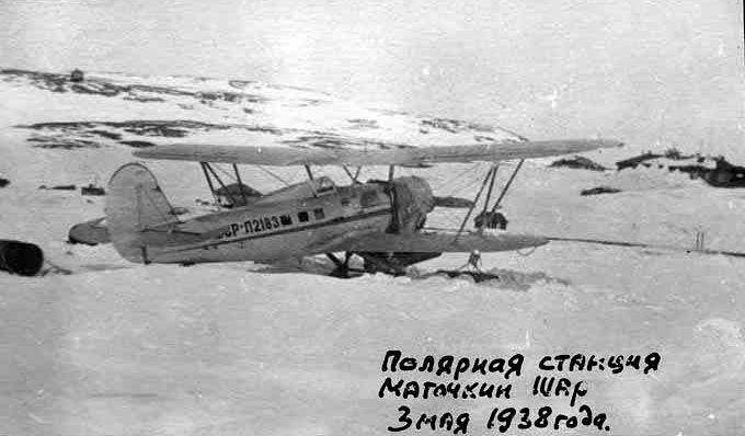 Полярная почта. Поликарпов ПР-5, заводской №128, СССР-Л2183 Полярная станция Маточкин Шар. 3 мая 1938 года